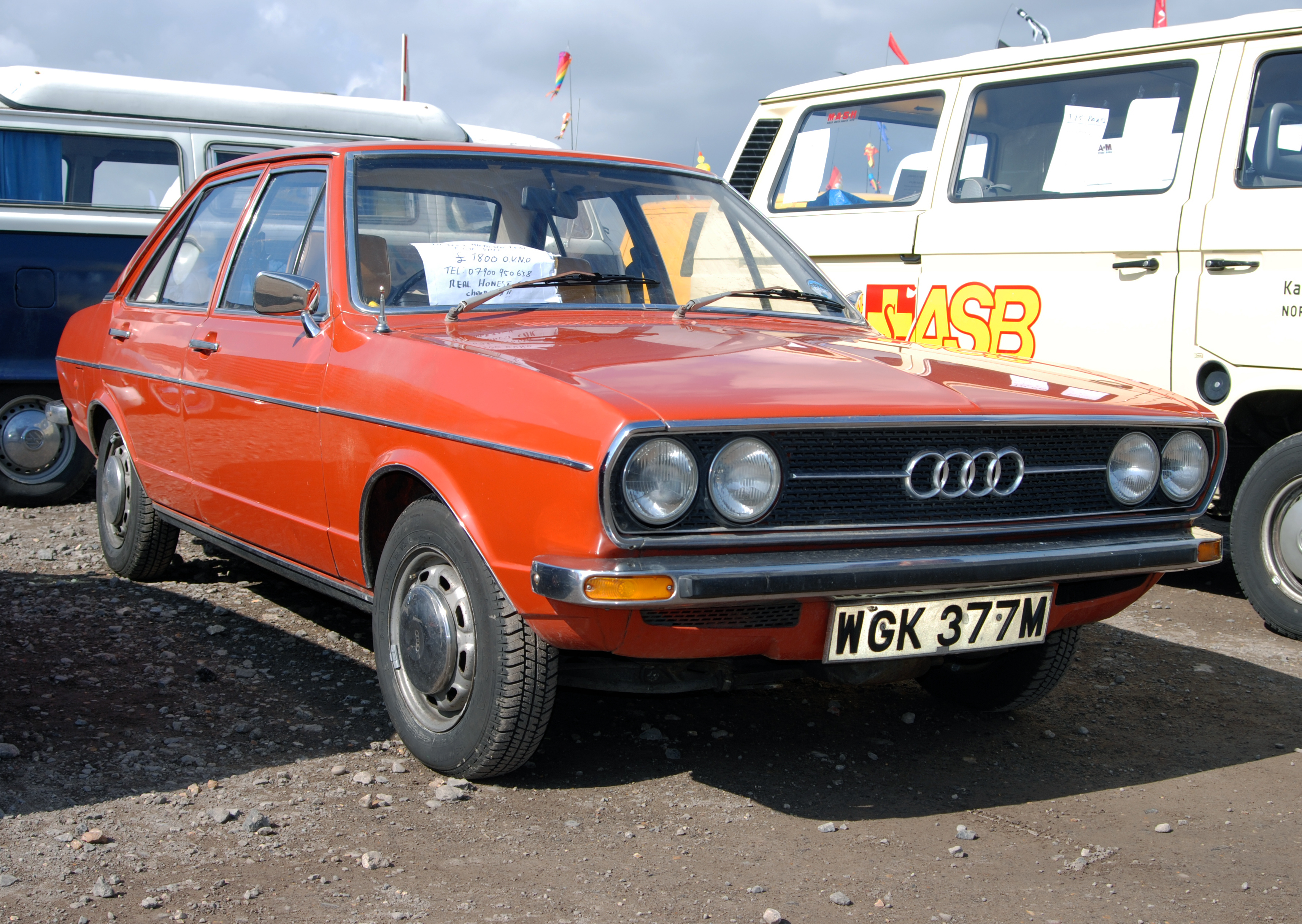 @ Volksworld 2009